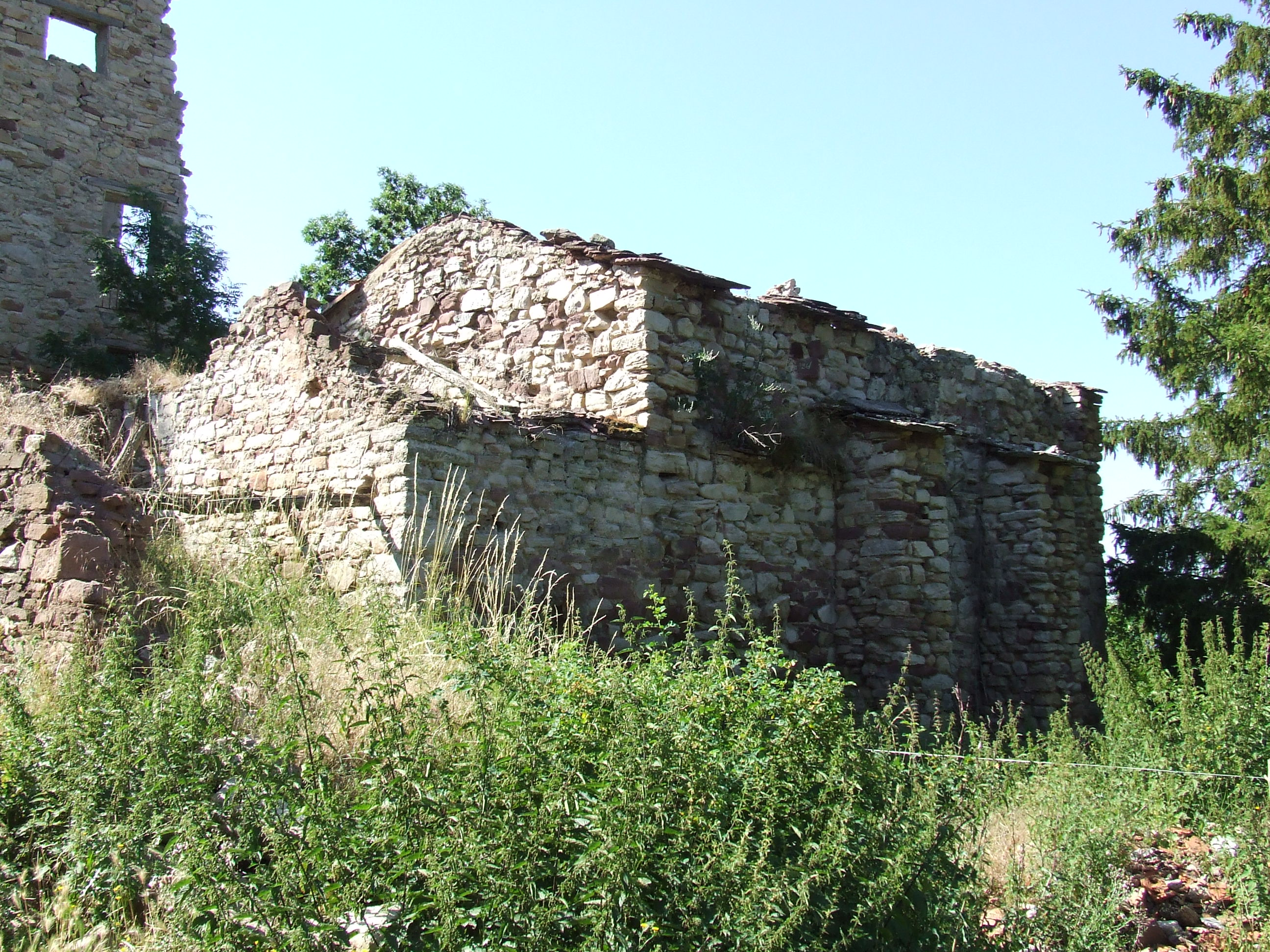 L'església de la Nativitat de la Mare de Déu de Larén, des del nord-est (Senterada, Pallars Jussà)